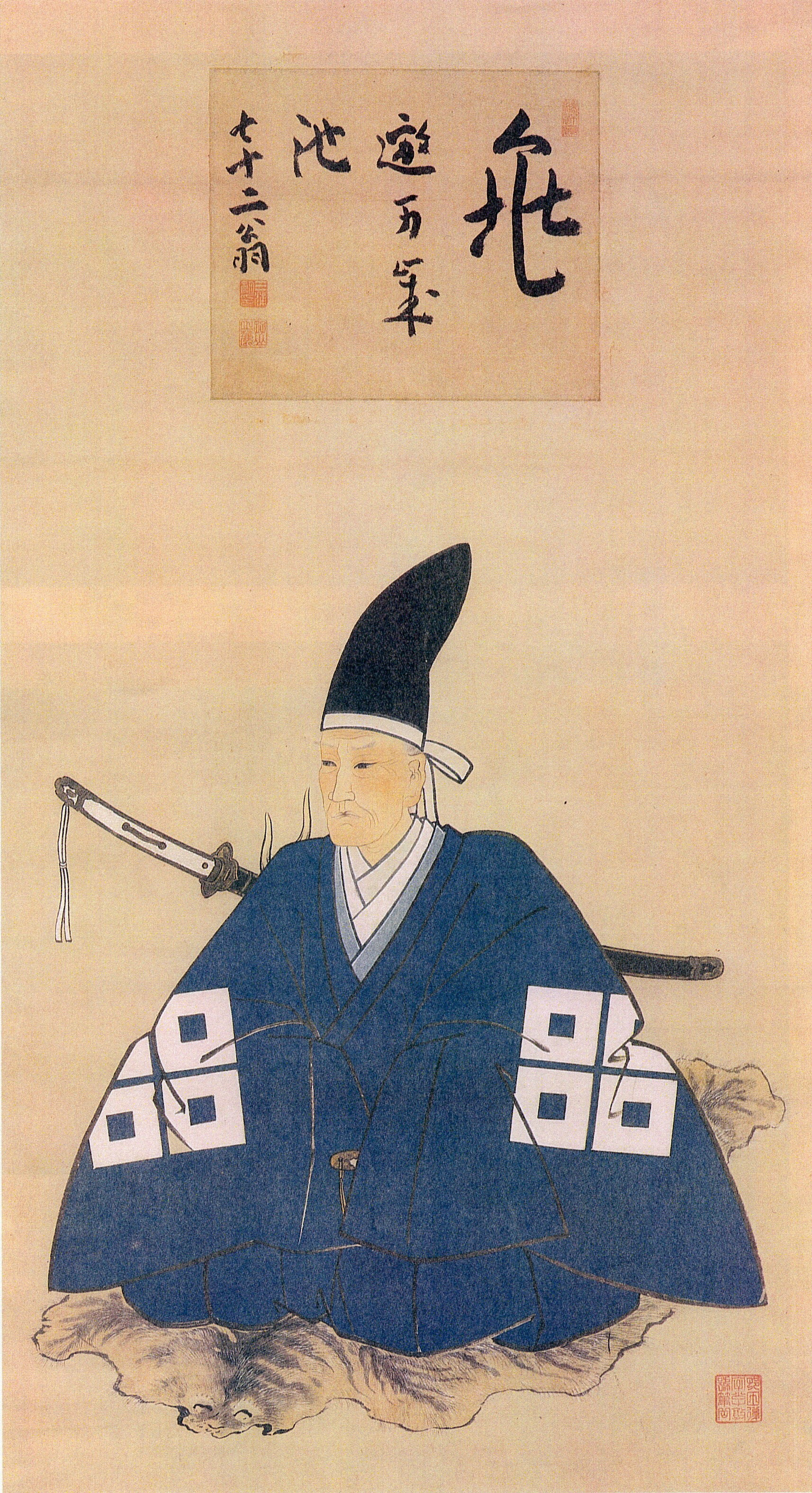 讃岐丸亀藩主京極高朗の肖像。